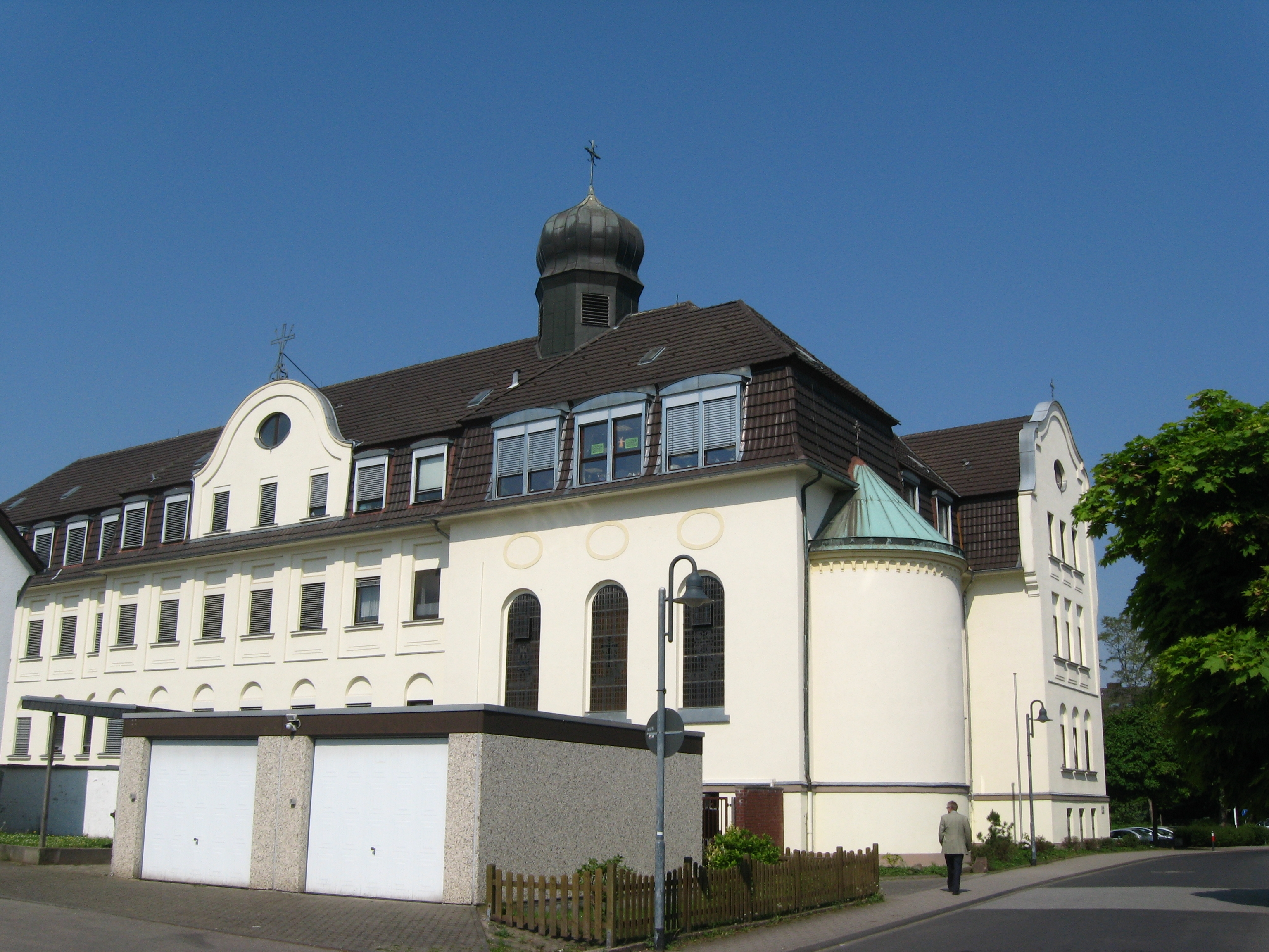 Niederkassel, Seniorenheim - Haus Elisabeth Datum: 24.04.2011 Urheber: M. Pfeiffer alias Benutzer:Gordito1869 Quelle: privates Fotoarchiv des Urhebers